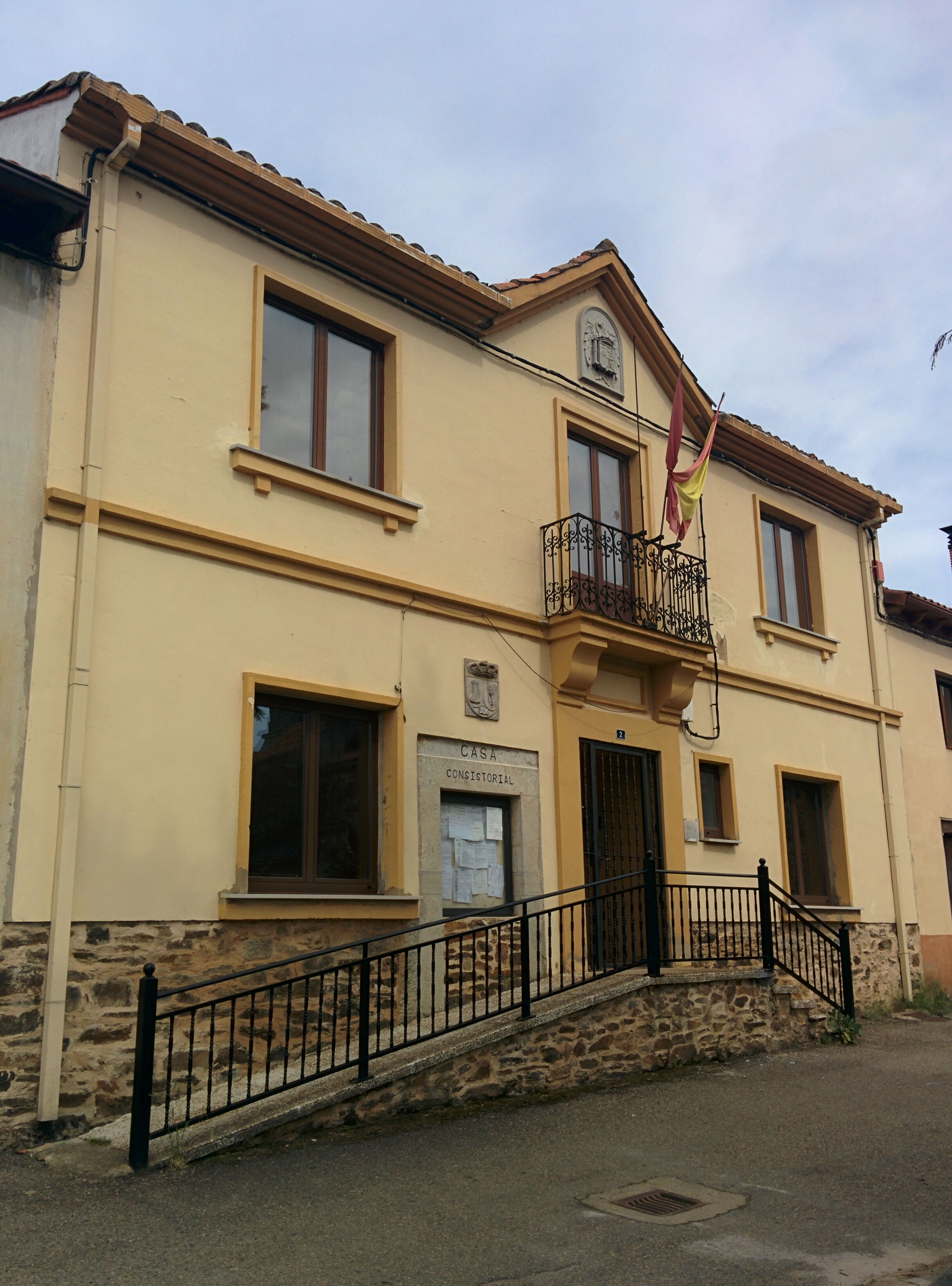 Ayuntamiento de Santa María de Ordás (León, España).